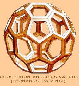 Icosaedro truncado dibujado por Leonardo da Vinci a pedido de Luca Pacioli para su libro La Divina proporción. A ese poliedro y a sus semejantes, por estar configurados por exágonos y pentágonos, se los conoce también como "exapentas", según Carlos Calvimontes .